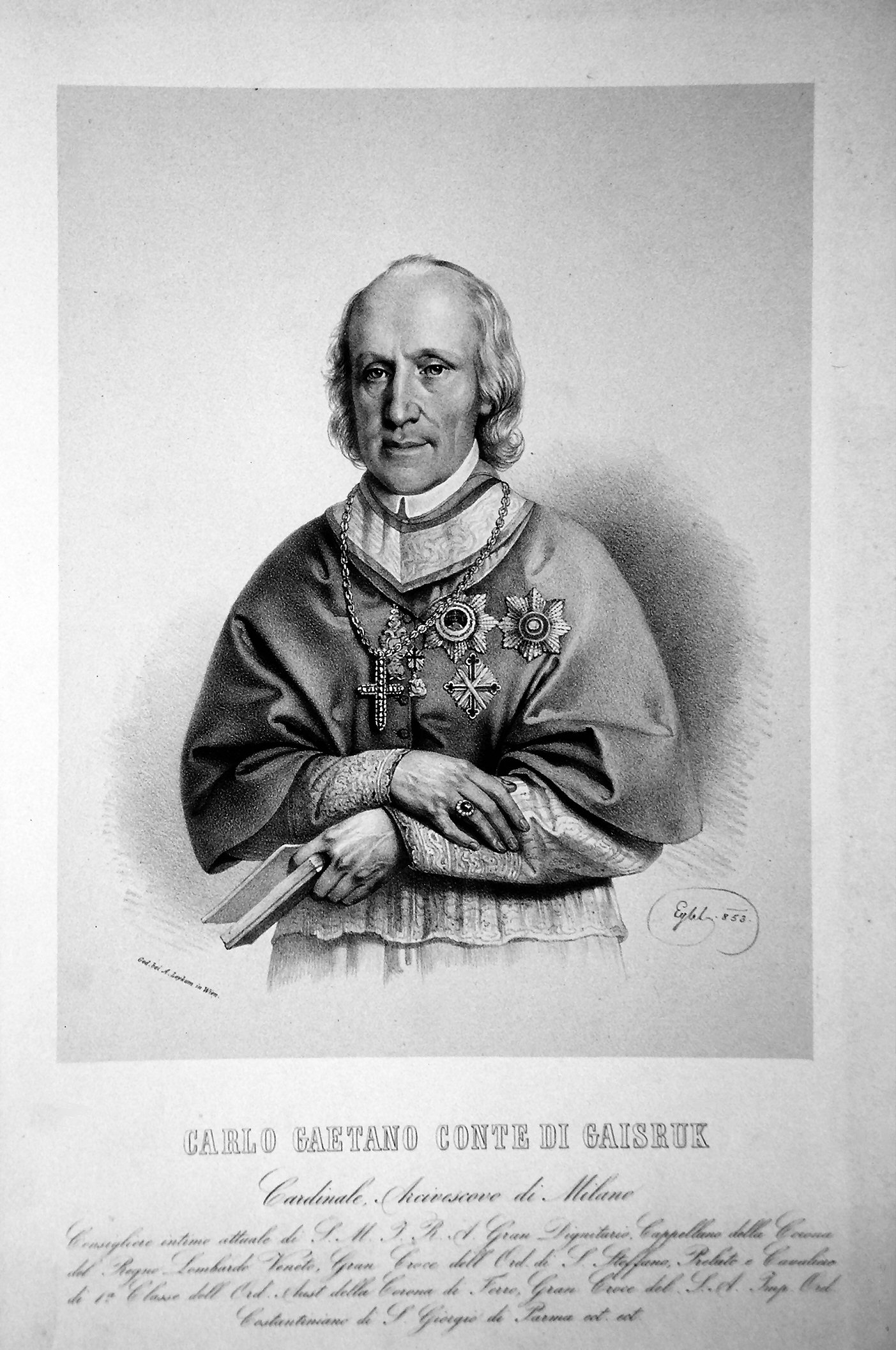 Karl Kajetan Graf Gaisruk (1769.1846), Kardinal, ERzbischof von Mailand. Lithographie von Franz Eybl, 1853